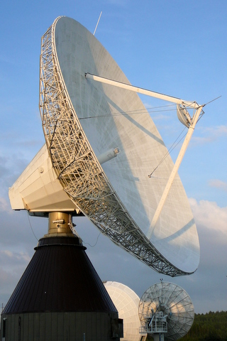 Antennas in Sweden. – JMT (T) 09:01, 11 March 2007 (UTC)